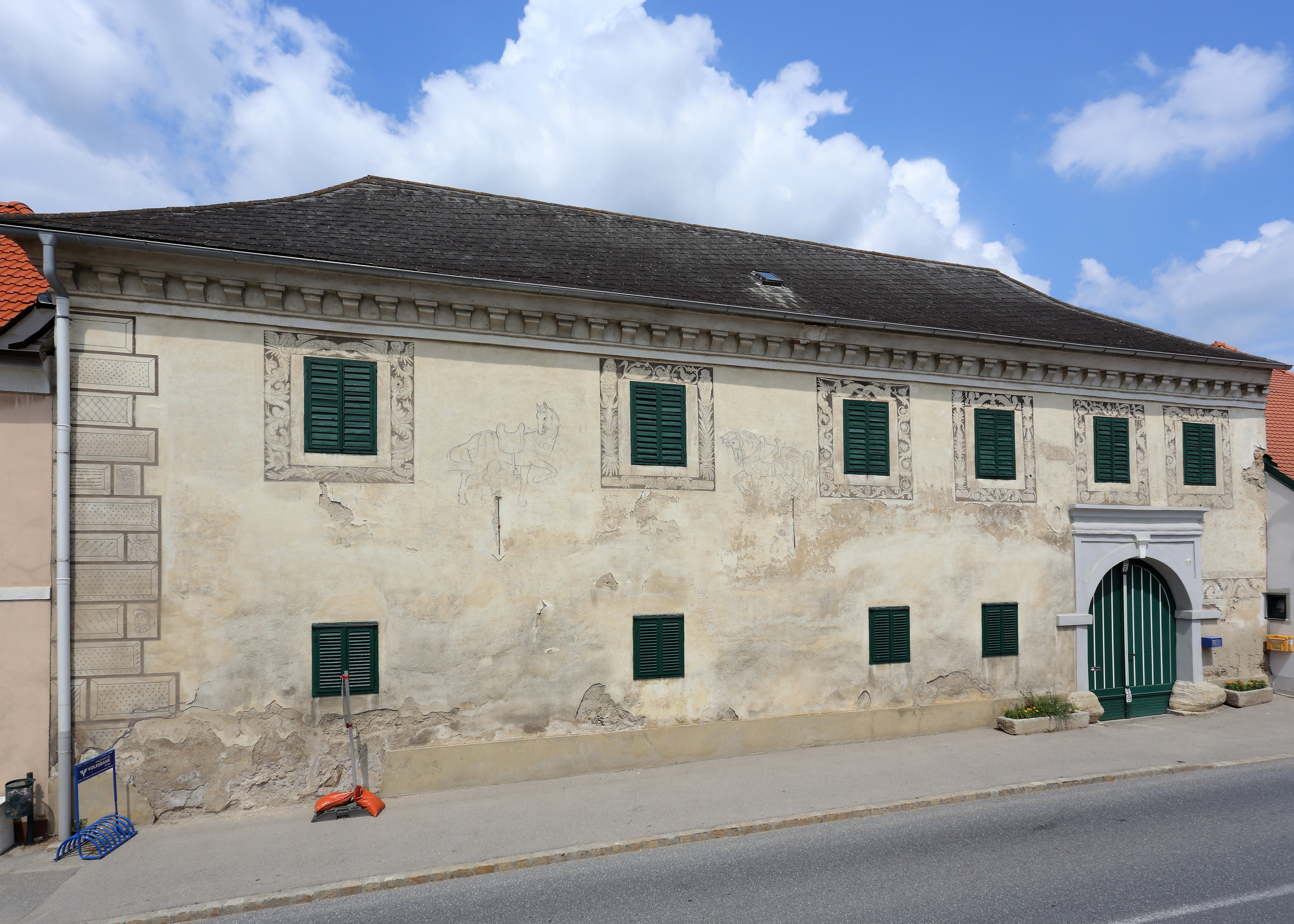 Wohnhaus beziehungsweise ehemaliges Herrschaftswirtshaus in Breiteneich, ein Ortsteil der niederösterreichischen Bezirkshauptstadt Horn.